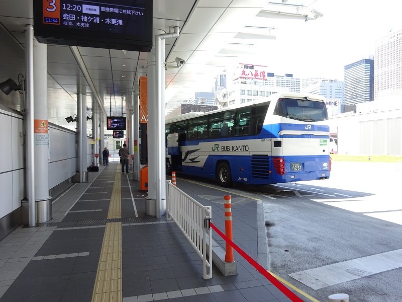 バスタ新宿